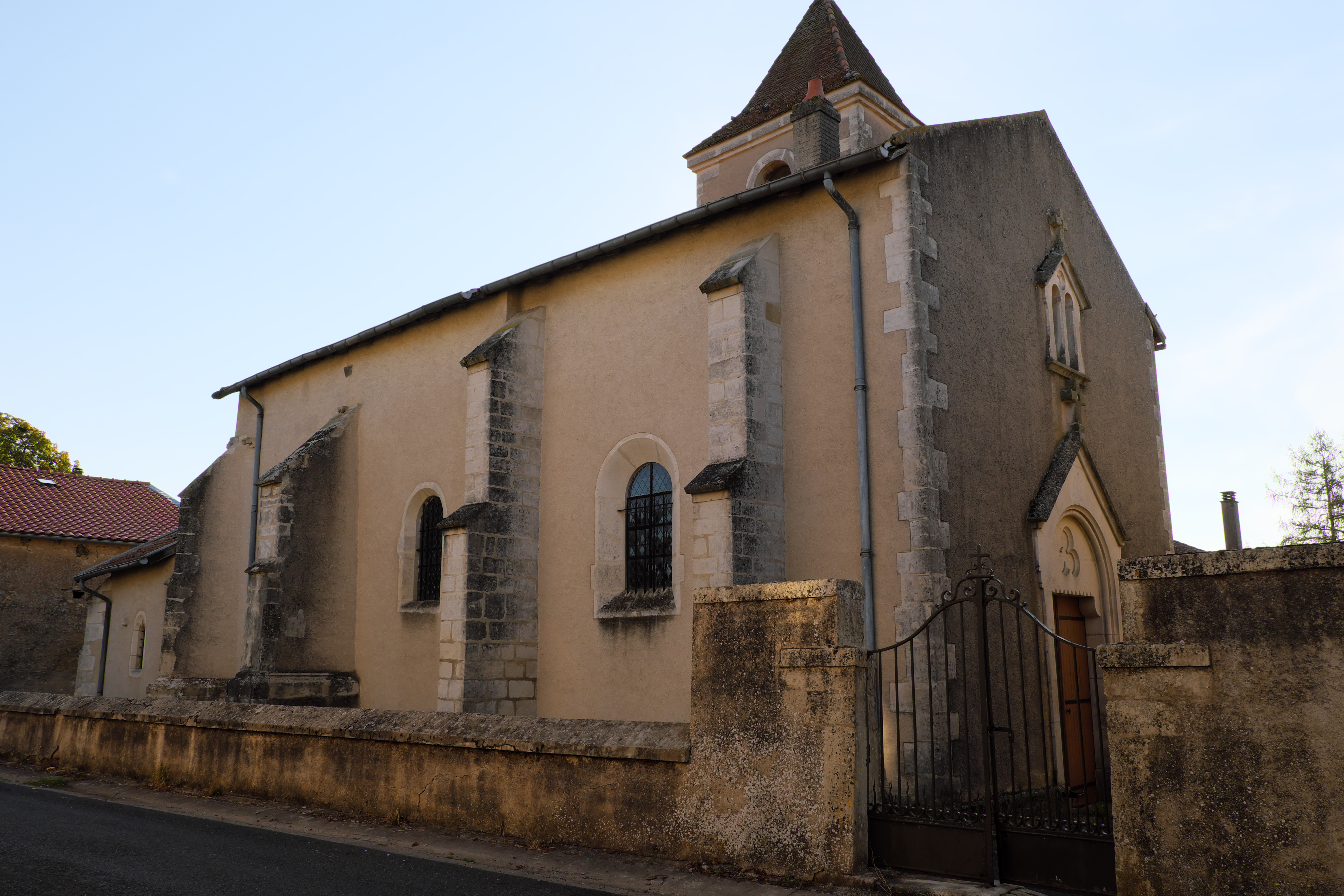 Église Saint-Lambert à Gézoncourt rn Meurthe-et-Moselle. .